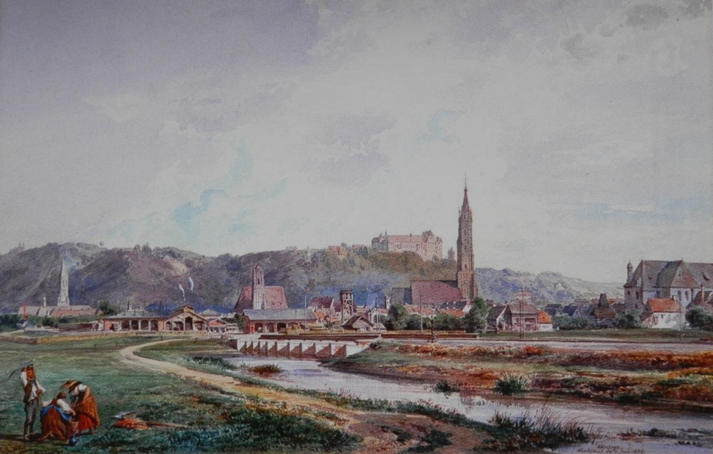 Ansicht des alten Landshuter Bahnhofs aus der Aquarell-Serie "Ansichten von Ortschaften an den bayerischen Ostbahnen" von Albert Emil Kirchner 1859